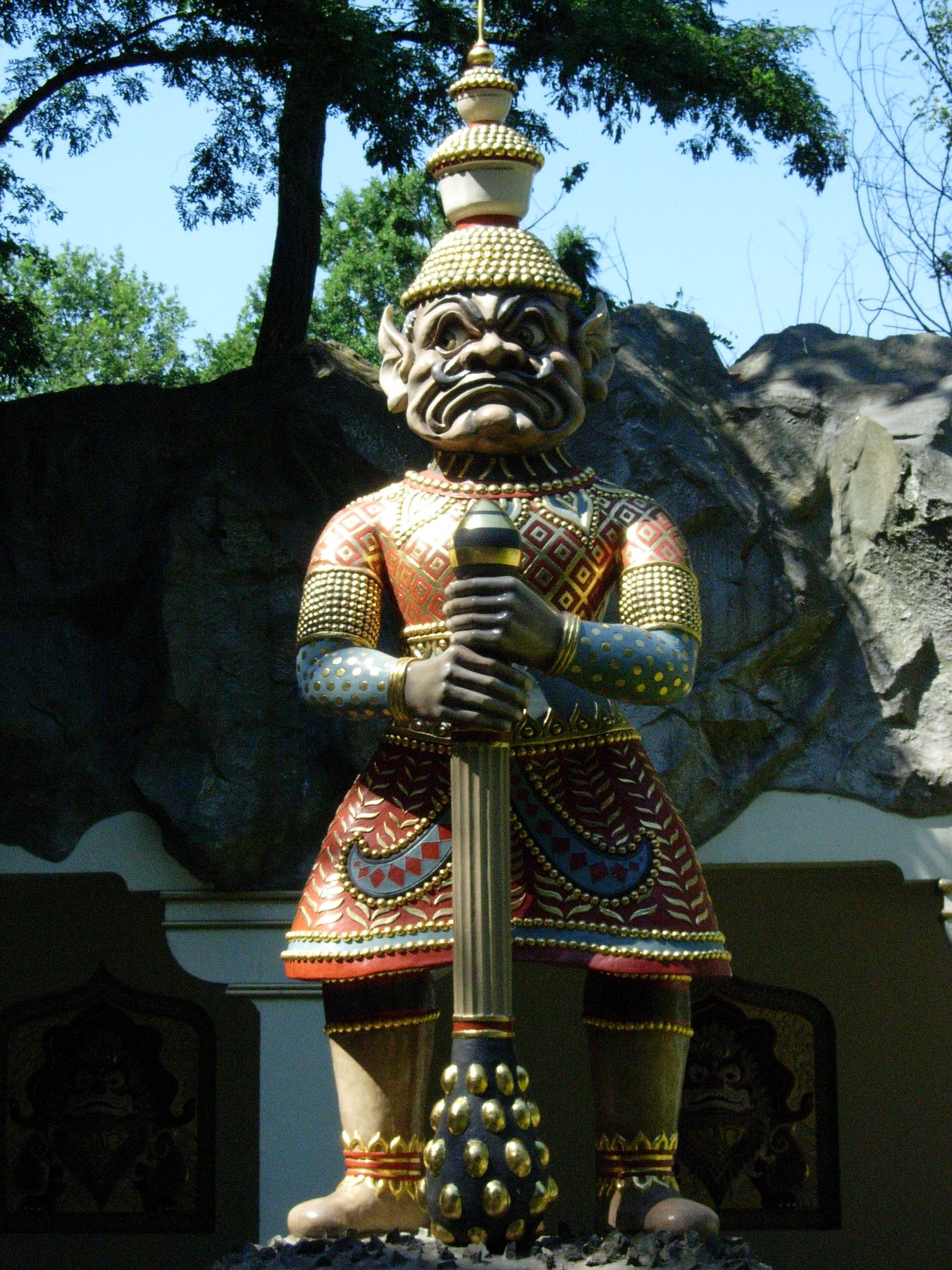 Garde des nénuphars indiens